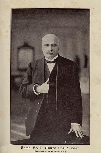 Marco Fidel Suárez (1855 a 1927), presidente de la republica de Colombia